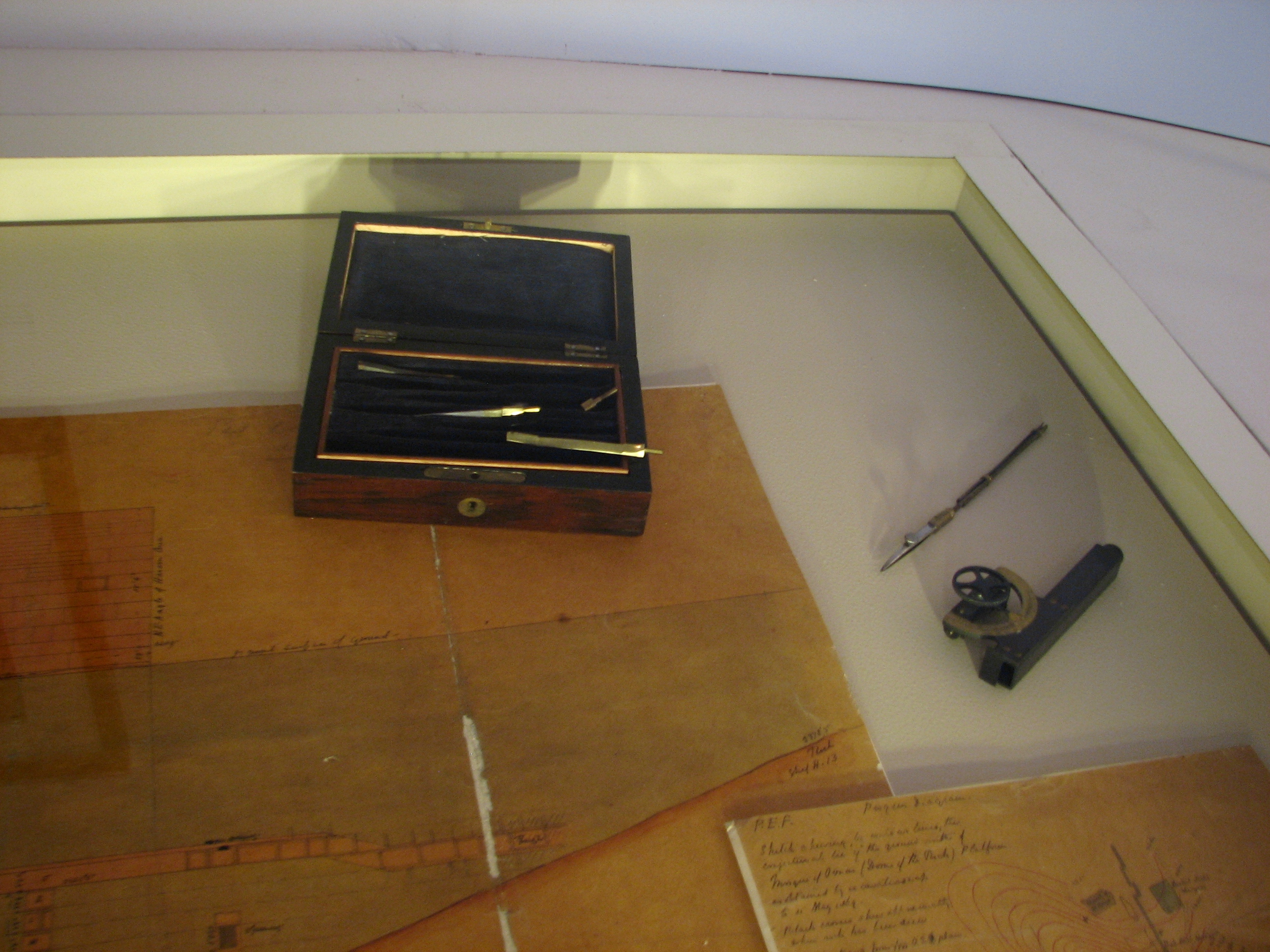 Palestine Exploration Fund, The Survey of Western Palestine equipment ציוד ששימש את עורכי סקר ארץ ישראל המערבית מטעם הקרן לחקר ארץ ישראל שנעשה בשנות השבעים של המאה התשעה עשרה הציוד מוצג במוזיון ישראל. נמסר על ידי הקרן שמושבה בלונדון כלי כתיבה , הקופסה שבה הם אוחסנו, מכשיר ניווט ומצפן ששימשו את עורכי הסקר וכן ניירות עבודה של עורכי הסקר